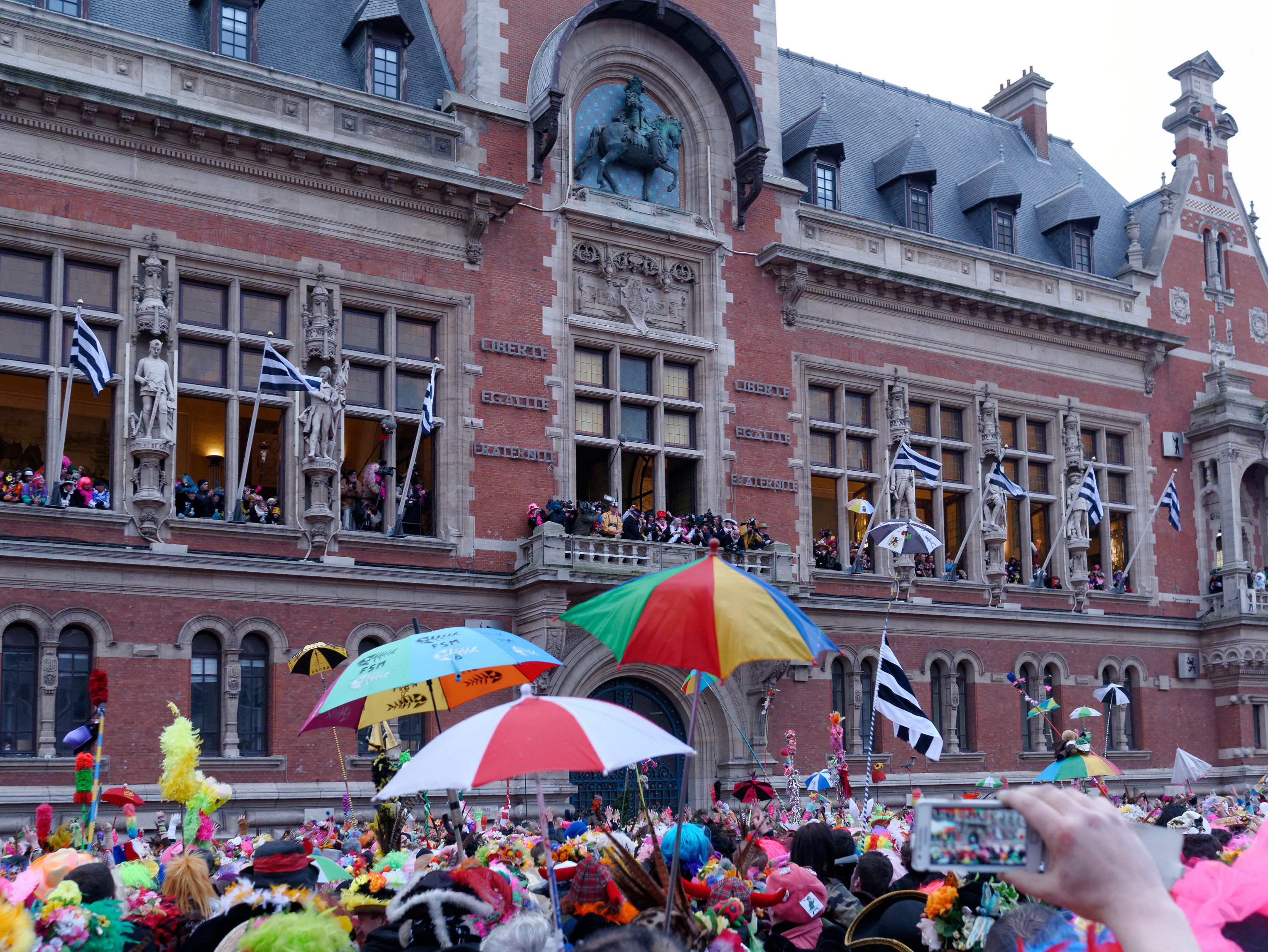 Carnaval de Dunkerque 2013 : le lancer de harengs devant la mairie.